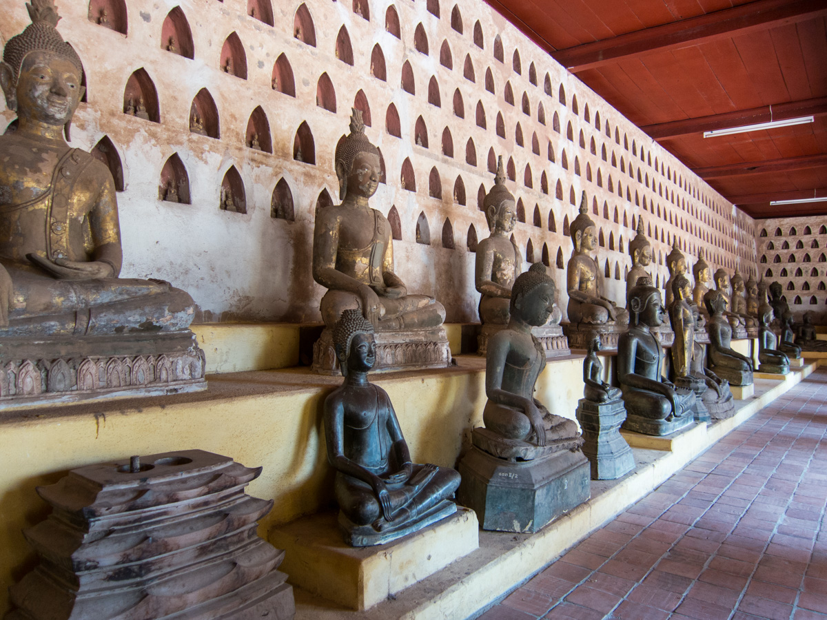 Buddha-Statuen im Sisaket Museum, Vientiane, Laos (2015)